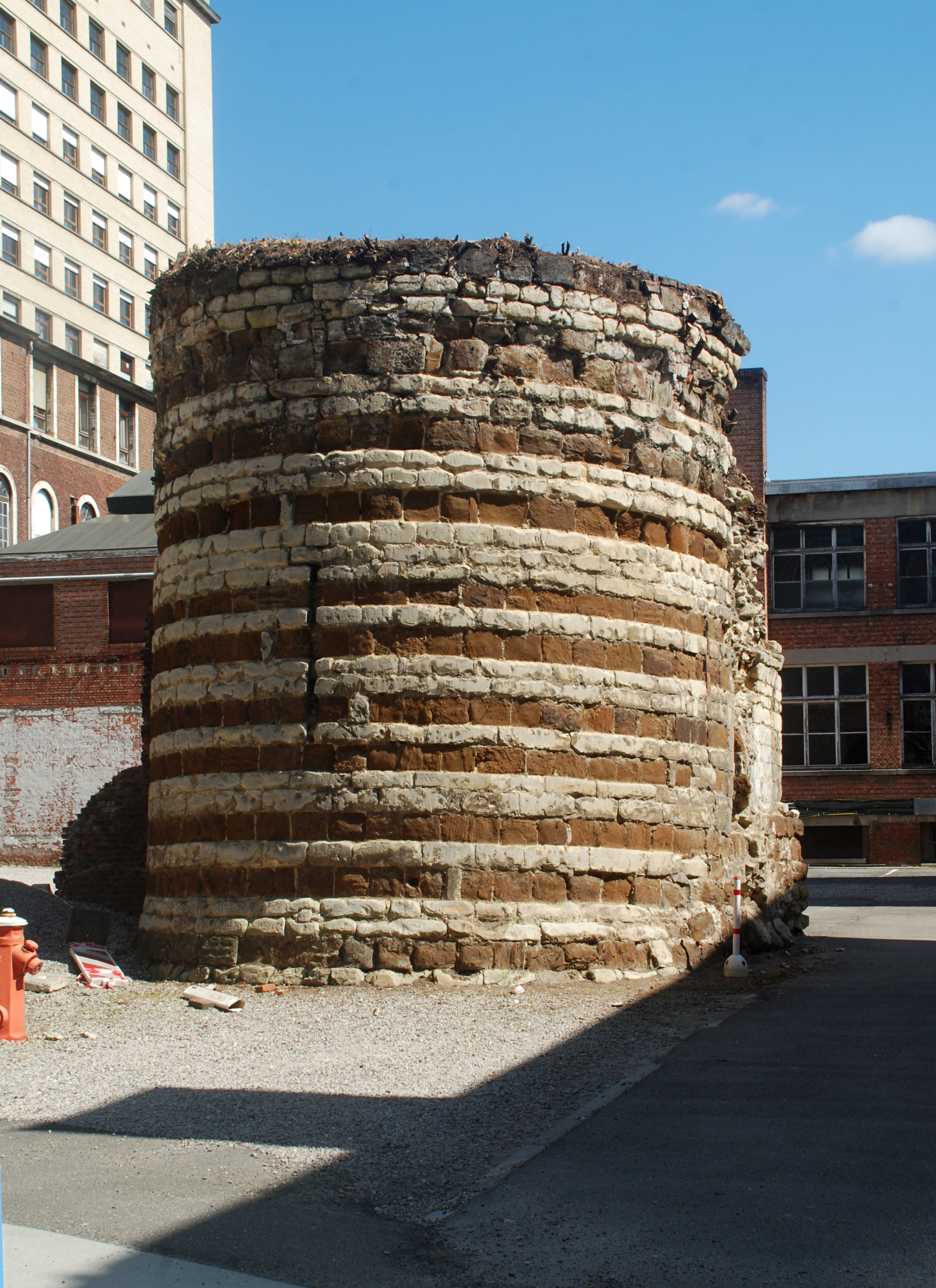 Belgique - Brabant flamand - Louvain - Première enceinte de Louvain - terrain des hôpitaux universitaires Saint-Pierre et Saint-Raphaël